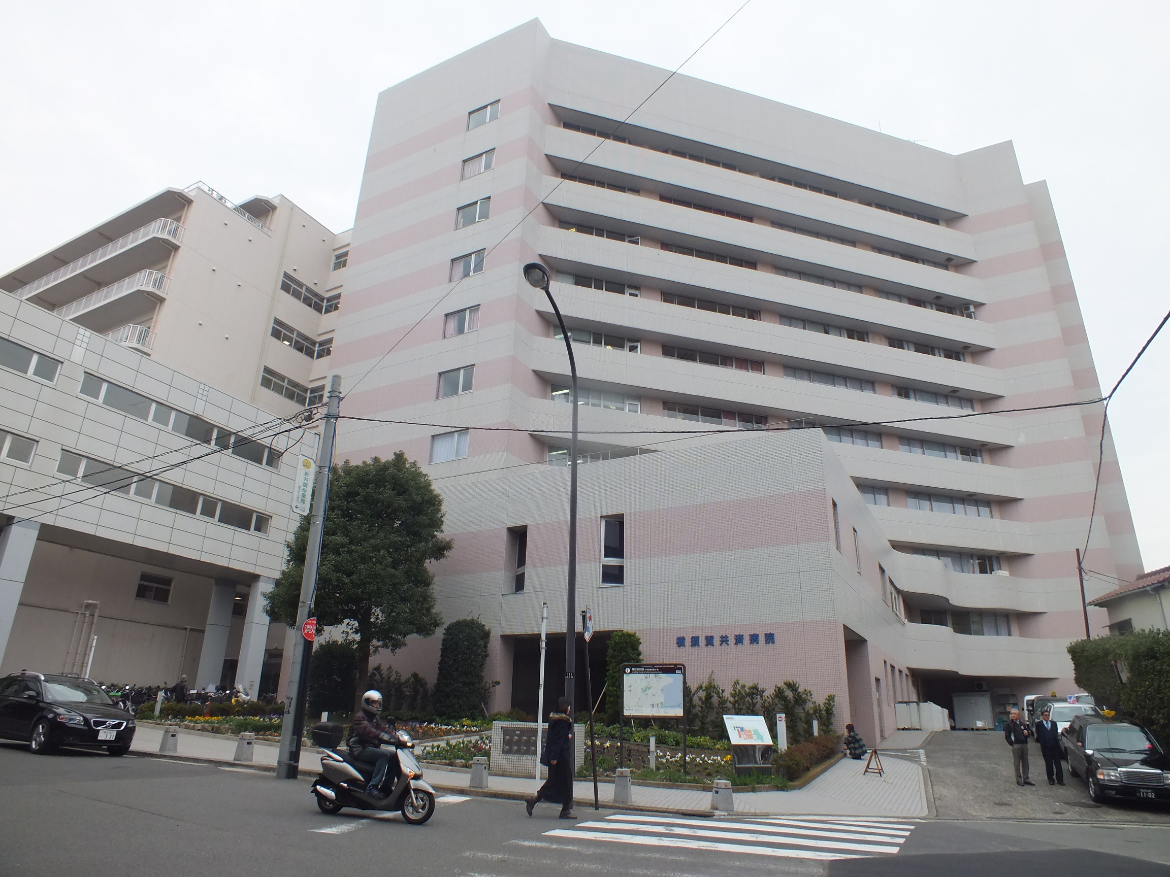 2013-11-25 Yokosuka Kyosai Hospital (横須賀共済病院)